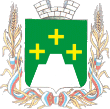 Герб городского поселения Кесовая Гора, Тверская область